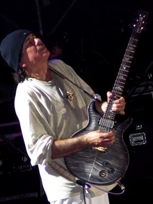 Carlos Santana during a concert in 2005